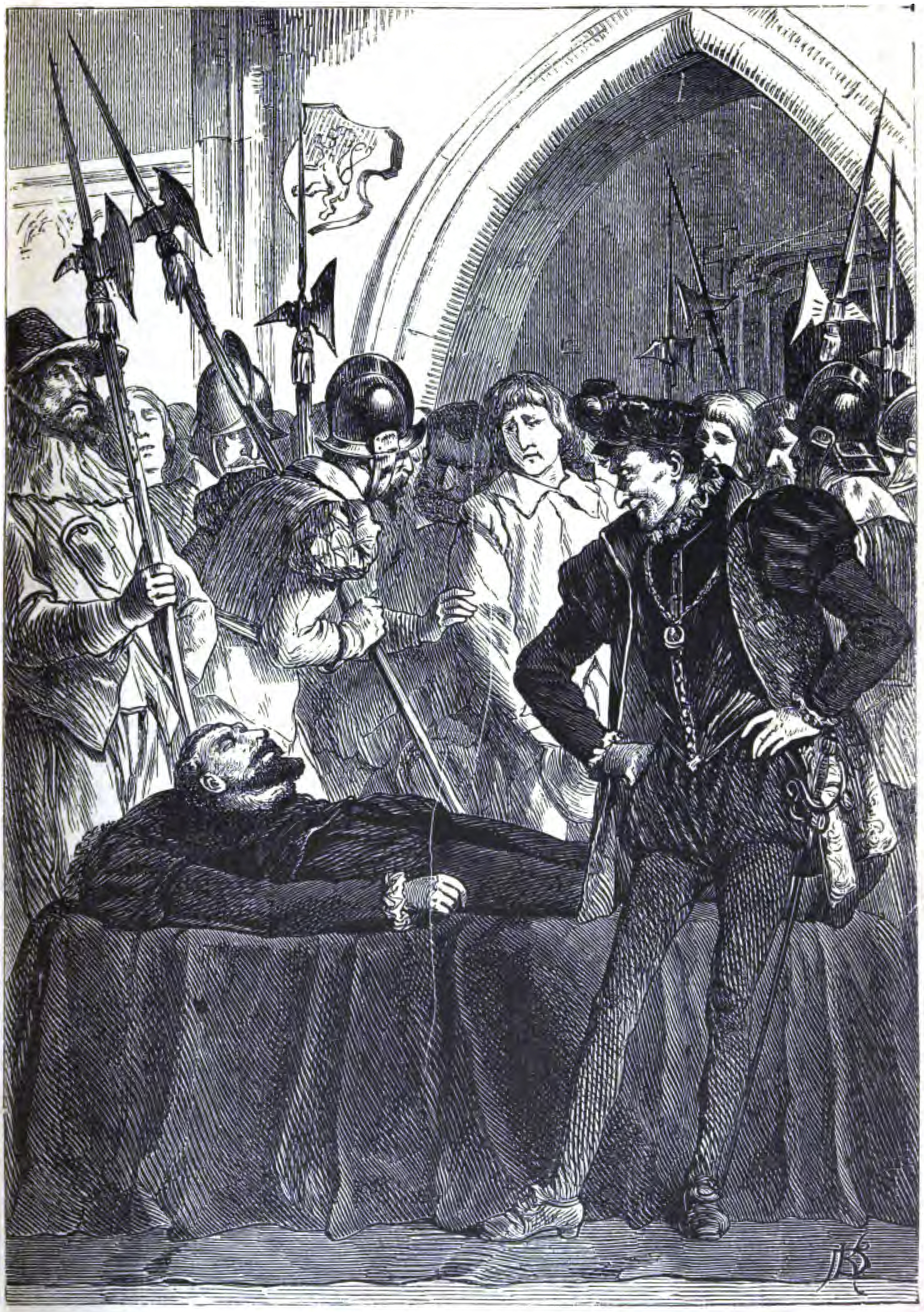 Bildunterschrift: Philipp Lang verhöhnt den Leichnam des enthaupteten Feldmarschalls Rußworm